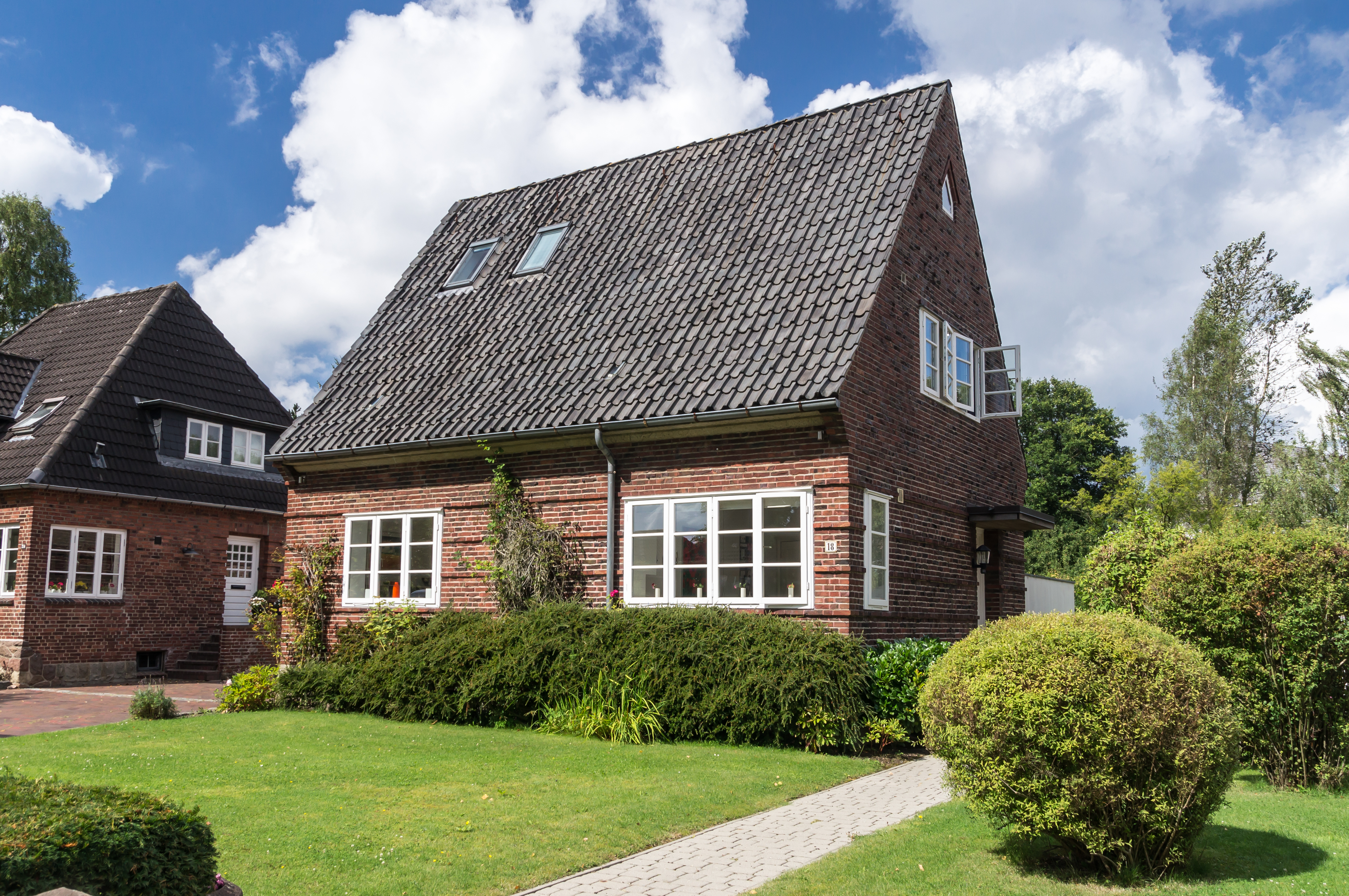 Flensburg-Westliche Höhe; Hermann-Löns-Weg 18; Einfamilienhaus; Denkmal-Nr. 10